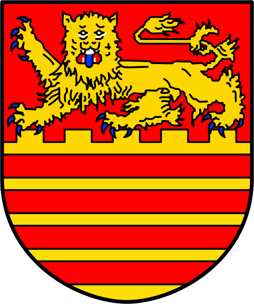 Am 7. Januar 1974 beschloss der Rat der Stadt Bad Lauterberg im Harz das heutige Wappen, das sich an das Wappenbild der vormaligen Grafen von Lutterberg anlehnt, welches seit dem Jahre 1209 belegt ist. Der Regierungspräsident in Hildesheim genehmigte dieses Wappen mit Schreiben vom 18. Januar 1974. Der Löwe entstammt dem Grafensiegel. Der Zinnenschnitt symbolisiert die beiden Burgstätten Scharzfels und Lutterberg, die heute im Stadtgebiet liegen. Die vier roten Balken stehen für die vier in der Einheitsgemeinde Bad Lauterberg im Harz zusammengeschlossenen Orte.